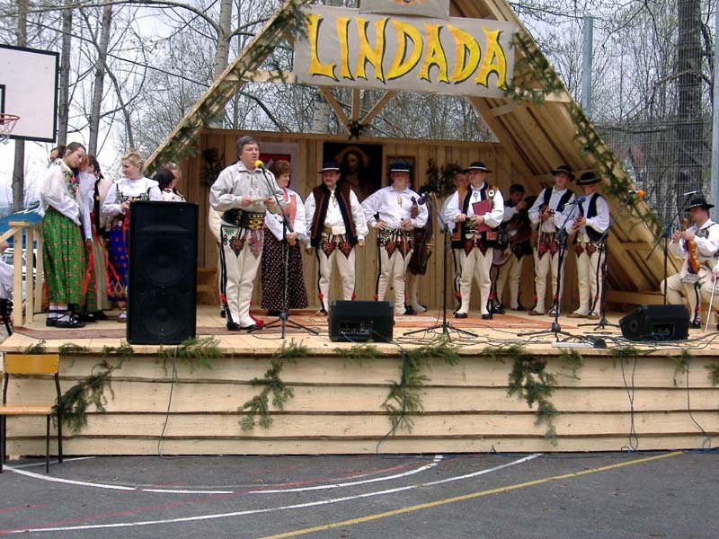 Leśnica: Festiwal Lindada zw. z Józefem Bryjką (w przygotowaniu: pisał o nim Tischner, wykorzystano jego postać jeszcze w kilku miejscach